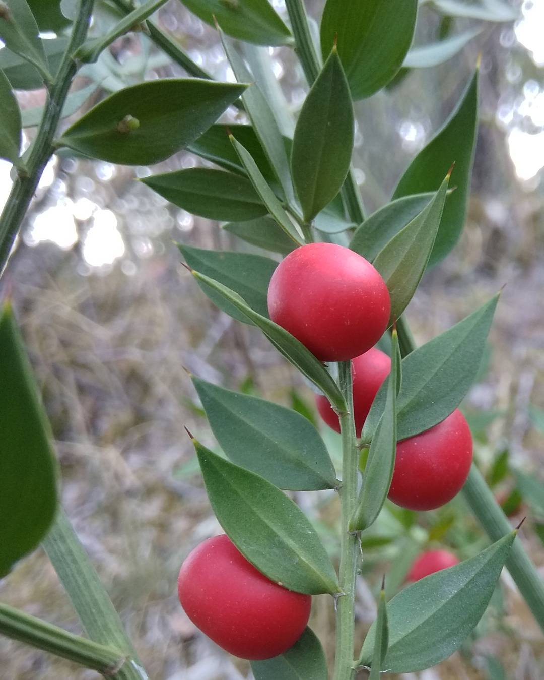 fruits du faux houx